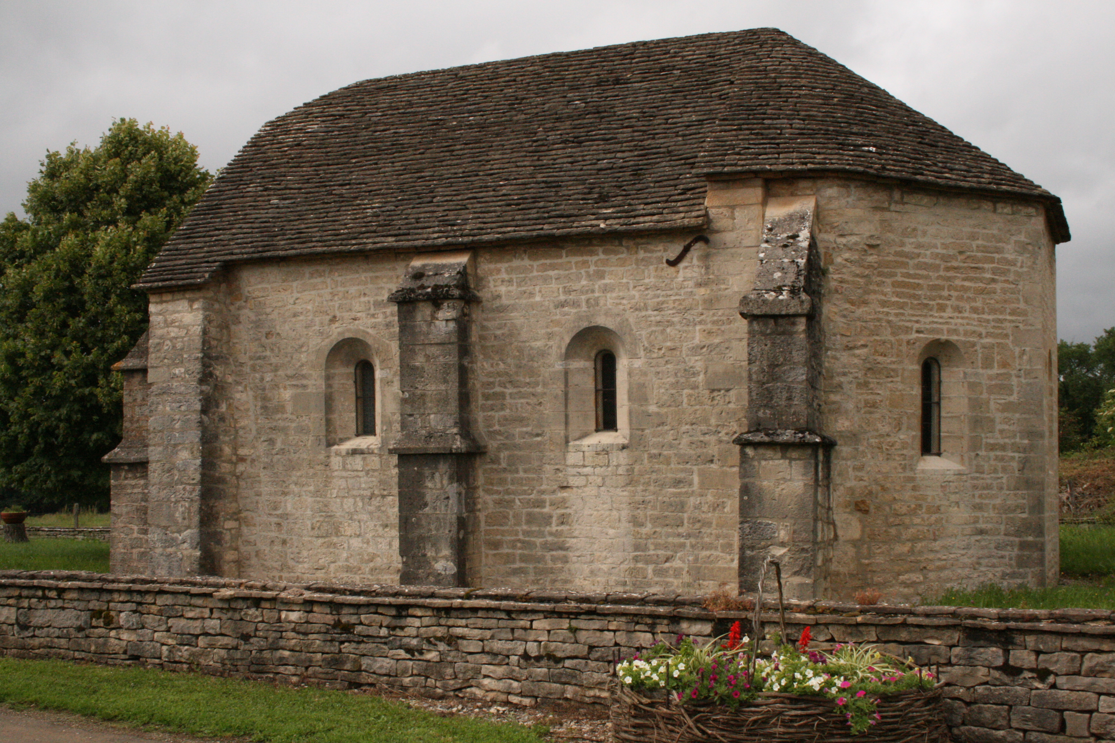 Chapelle Saint-Igny, à Villers-le-Sec